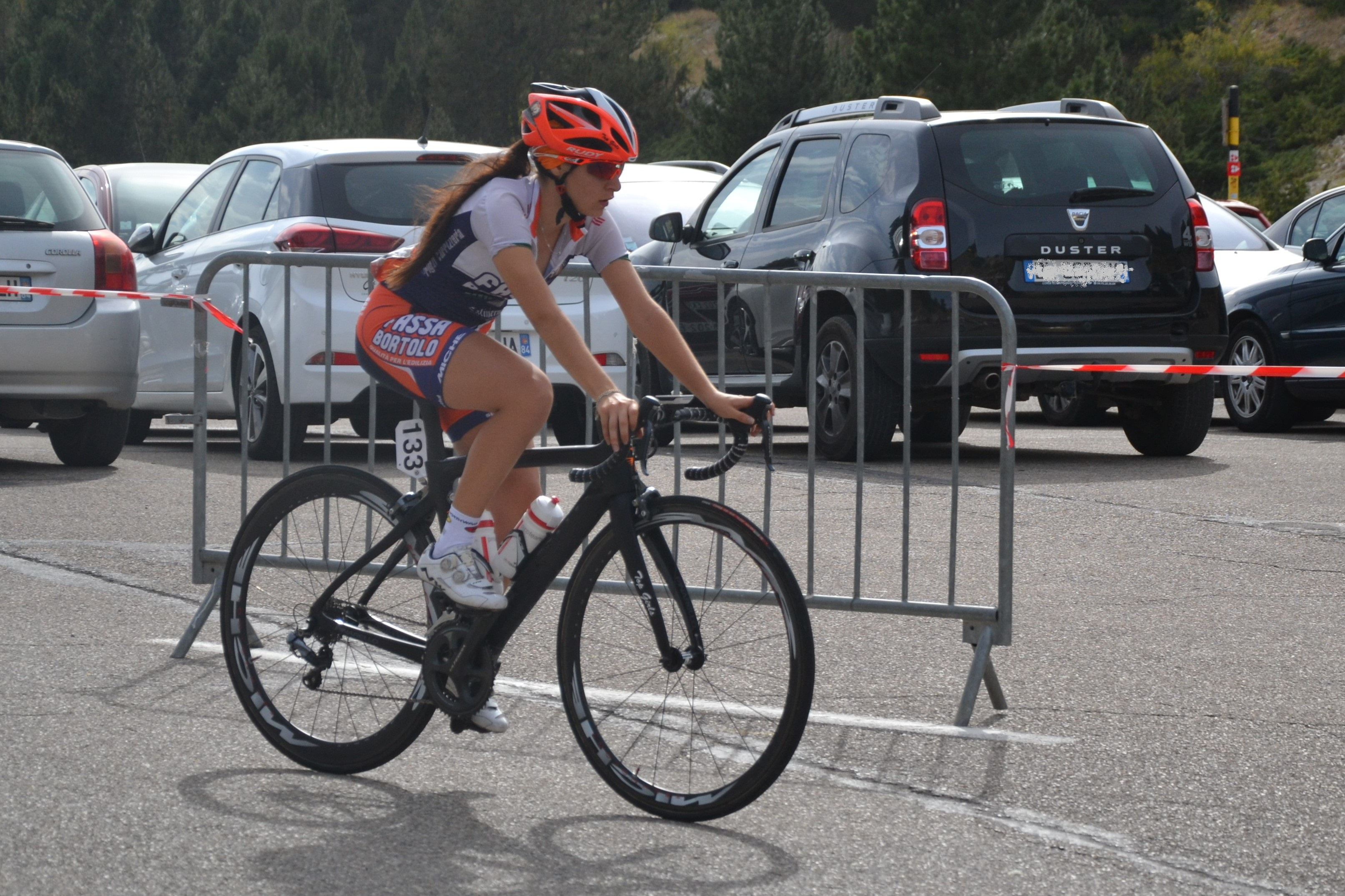 Sara Mariotto au chalet Reynard, dans l'ascension du Mont Ventoux